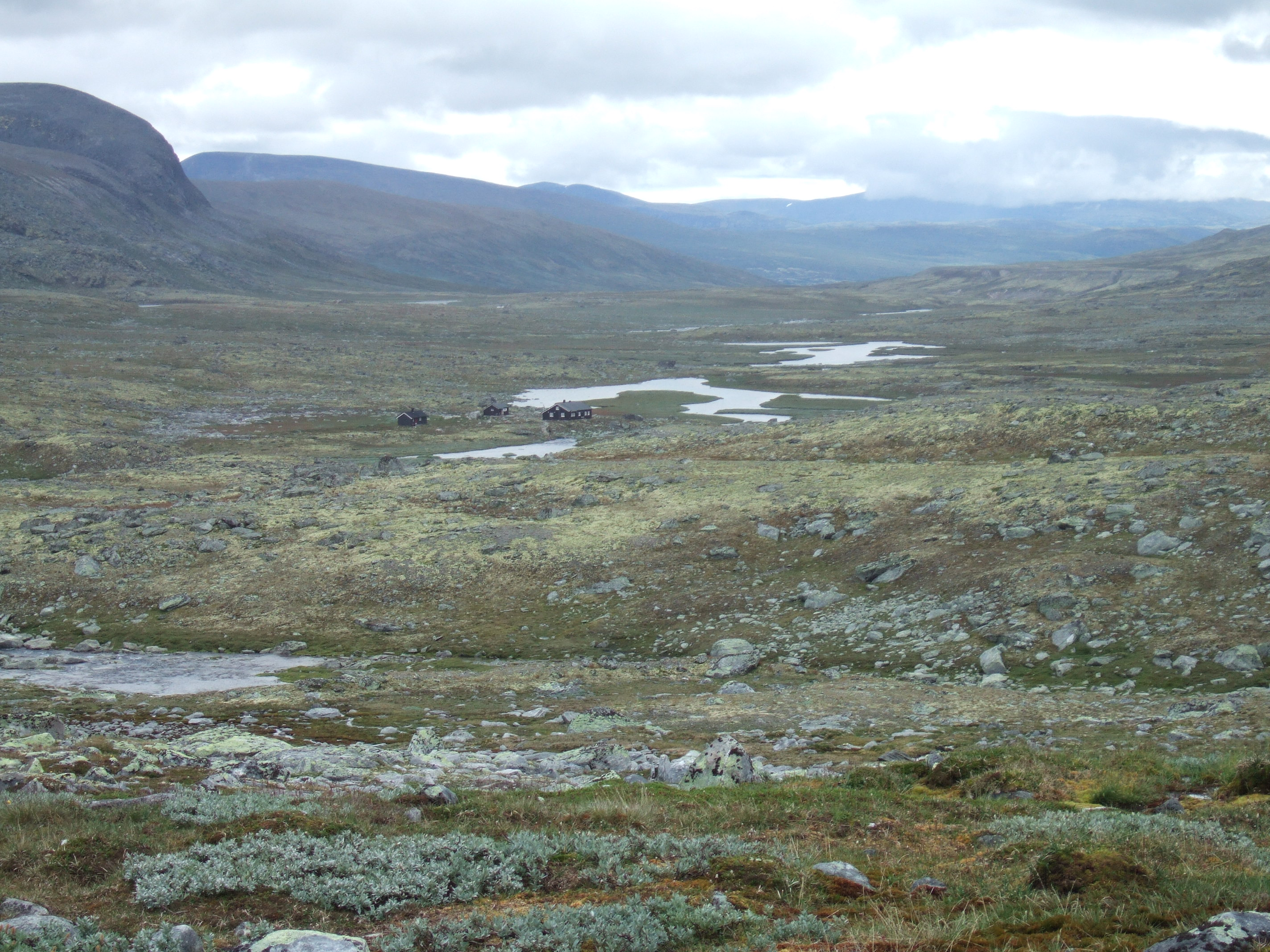 Stropla is to a branch from the west to Driva via Kaldvella in Oppdal municipality in Sør-Trøndelag county.